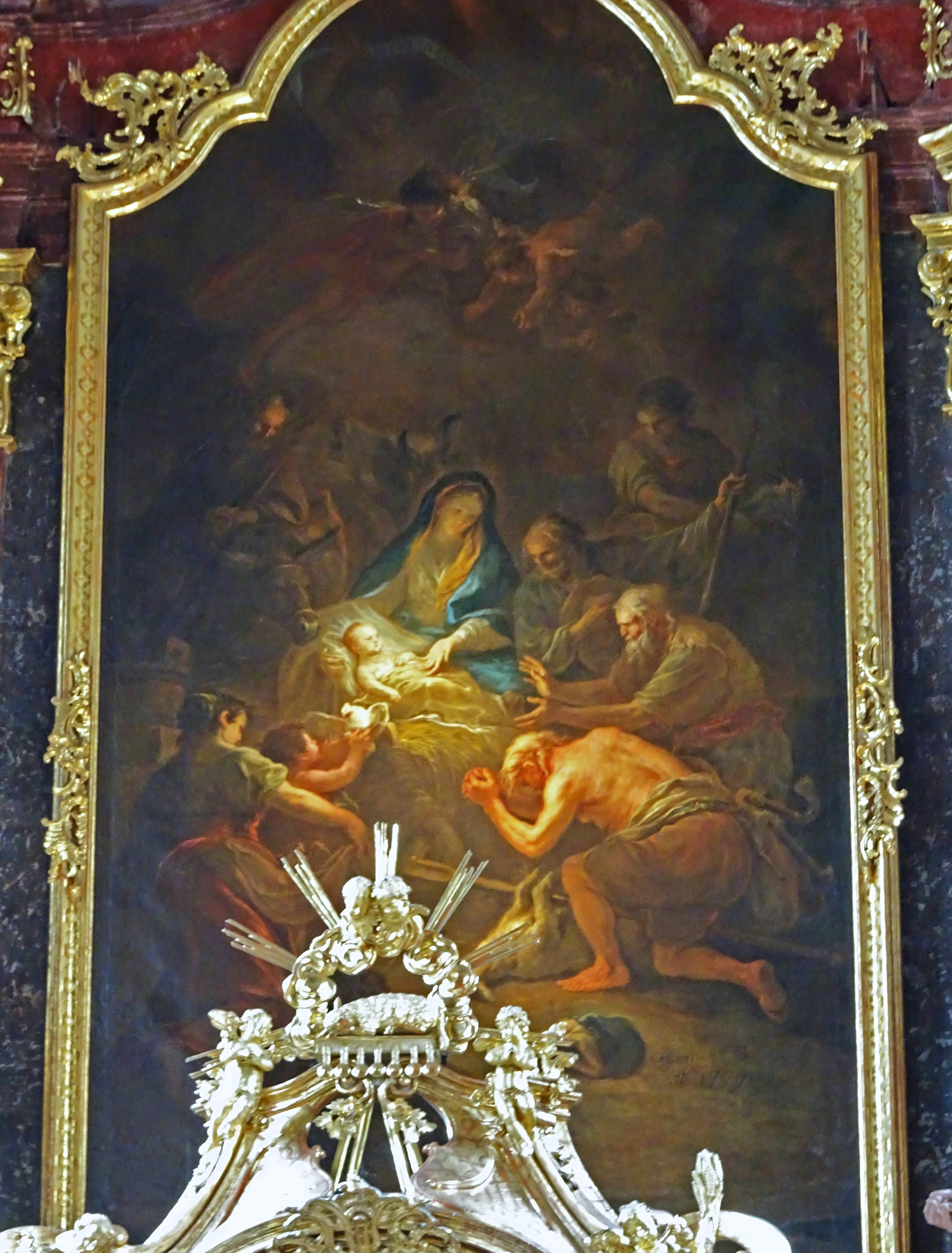 Stift Rein, das Hochaltarbild (1779) von Martin Johann Schmidt, genannt Kremser Schmidt, zeigt die Anbetung der Hirten